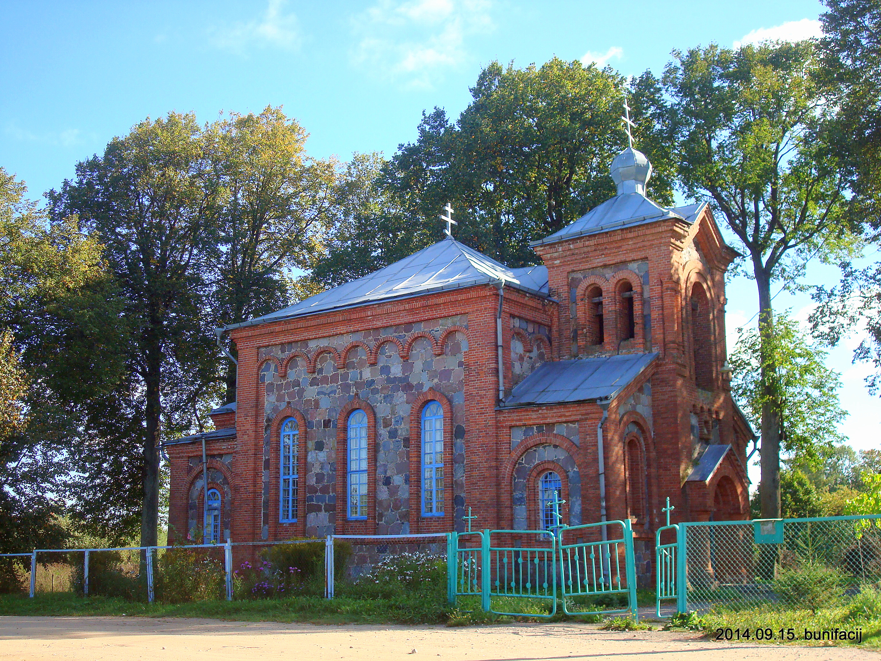 Общий вид церкви в Лесковичах